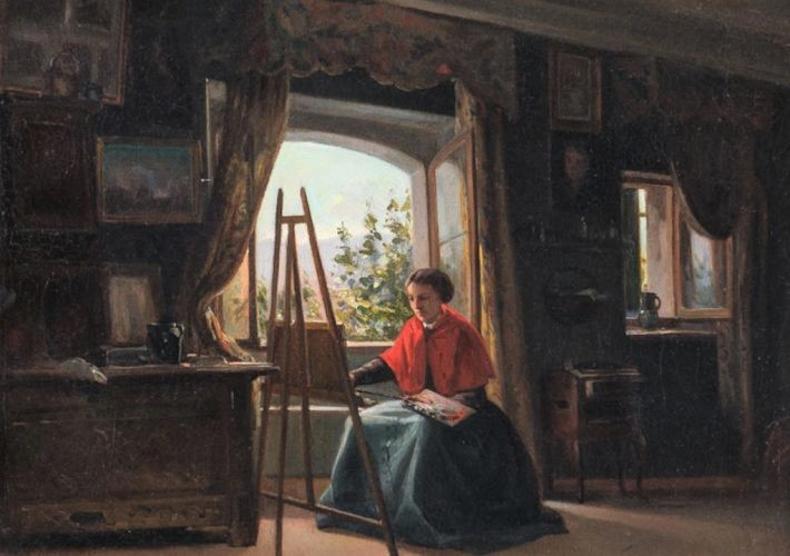 "La pittrice", olio su tela, 32 x 40 cm.